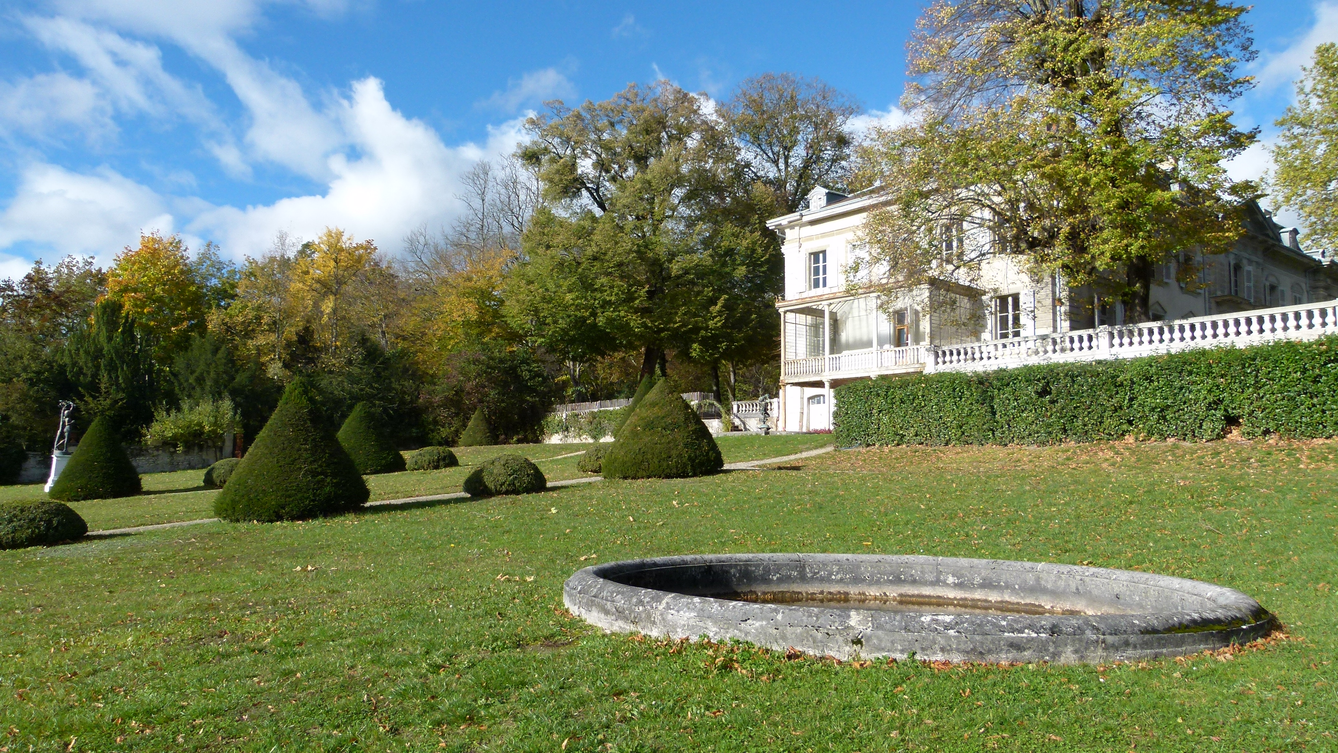 Château de Voltaire à Ferney